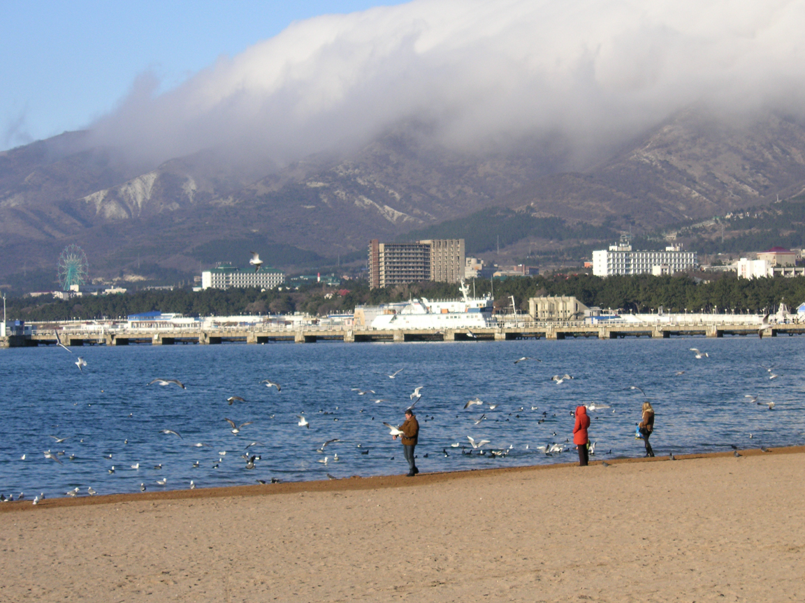 Геленджик. День. Горожане кормят хлебом водоплавающих птиц, зимующих на воде Геленджикской бухты. На переднем плане песчаный пляж; на воде водоплавающие птицы, над водою чайки; далее виден пирс геленджикского порта, здания на северо-восточном берегу бухты и облачная «борода» над хребтом Маркотх.